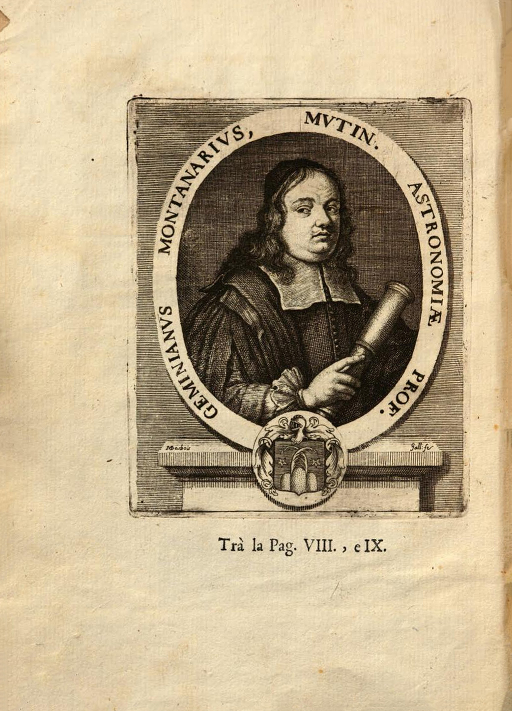 ritratto di Geminiano Montanari